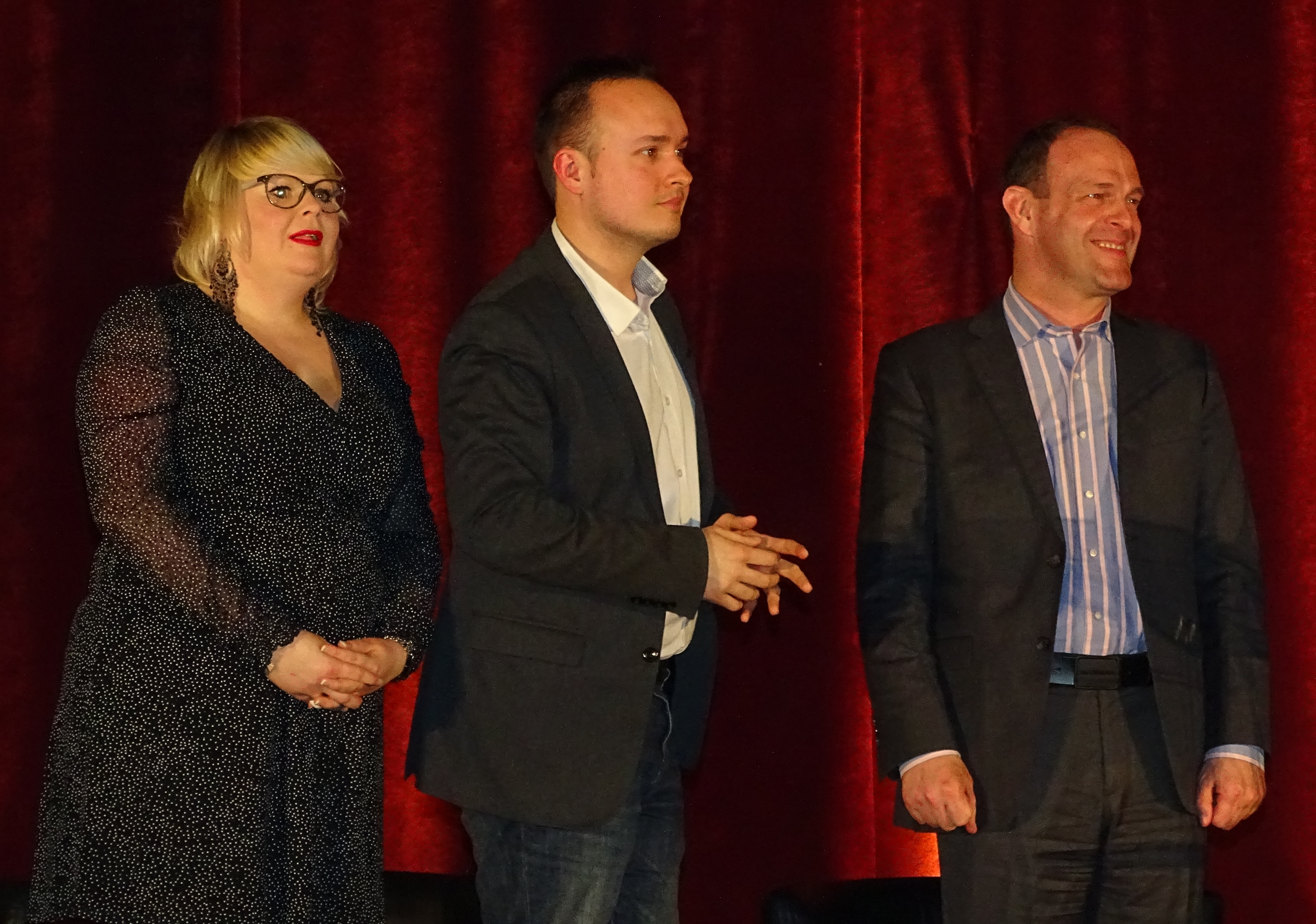 Reportage réalisé à l'occasion du meeting de soutien aux candidats des cantons de Hénin-Beaumont-1 (Maryse Poulain et François Vial) et Hénin-Beaumont-2 (Christopher Szczurek et Aurélia Beigneux) en présence de Marine Le Pen à Hénin-Beaumont le 25 mars 2015.